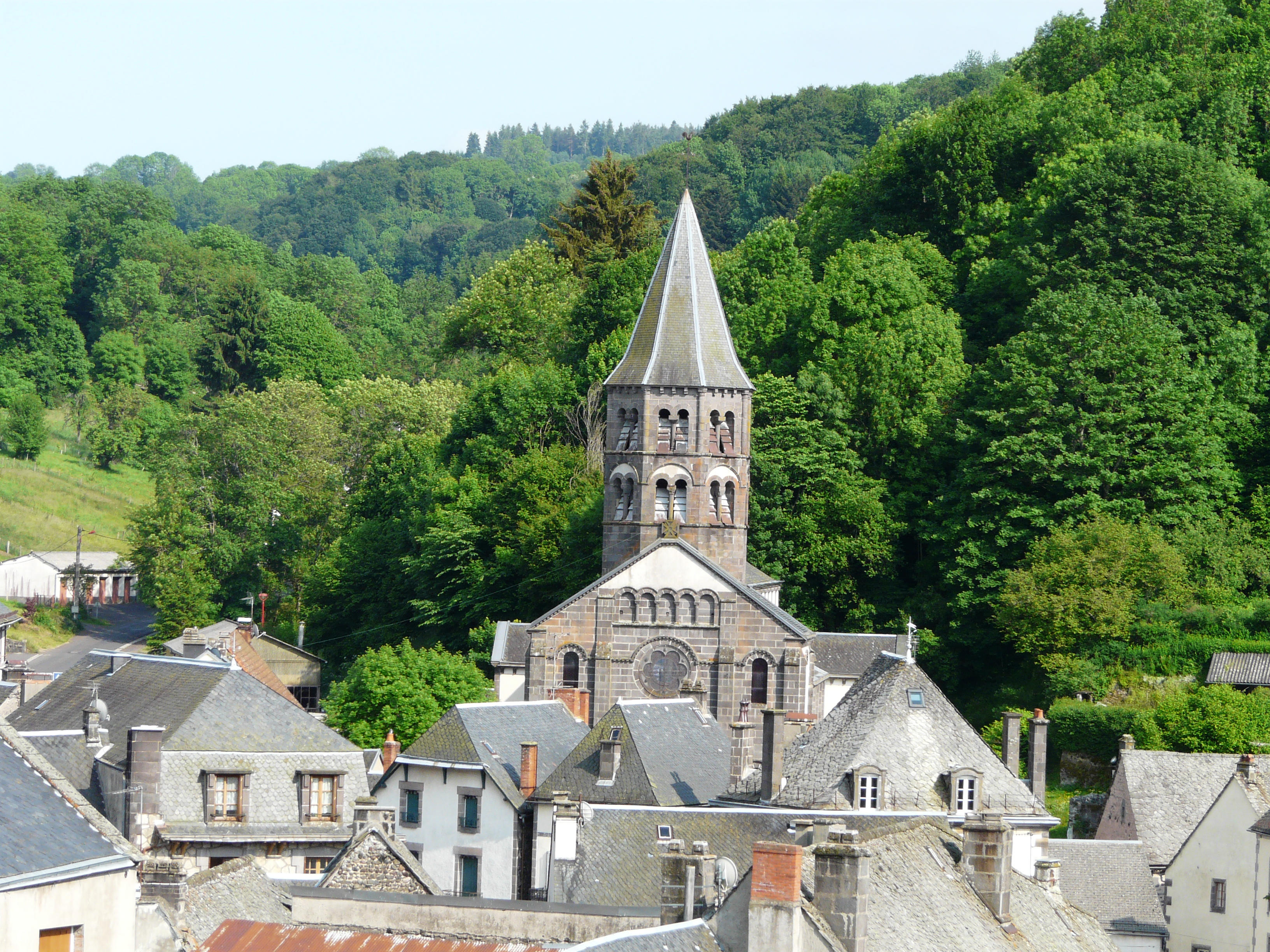 L'église de Rochefort-Montagne, Puy-de-Dôme, France.